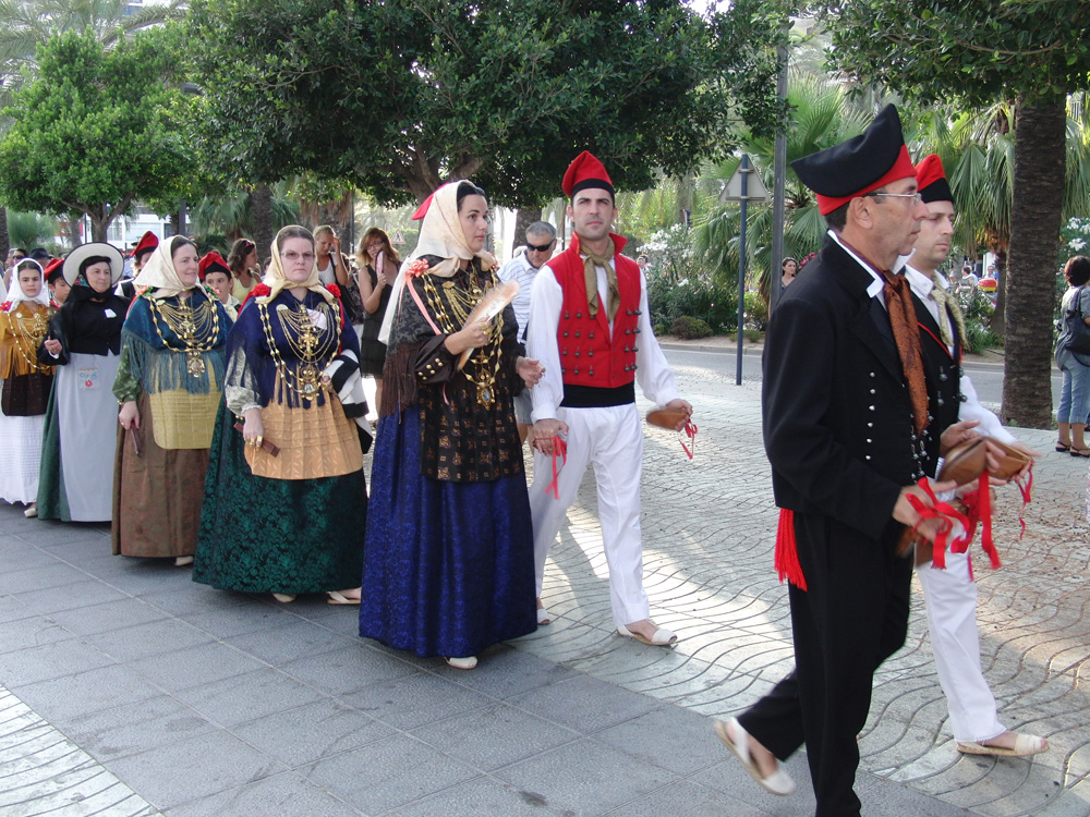 Trachten der Ibizenkos, die Männer spielen die großen Kastagnetten (Castañoles)